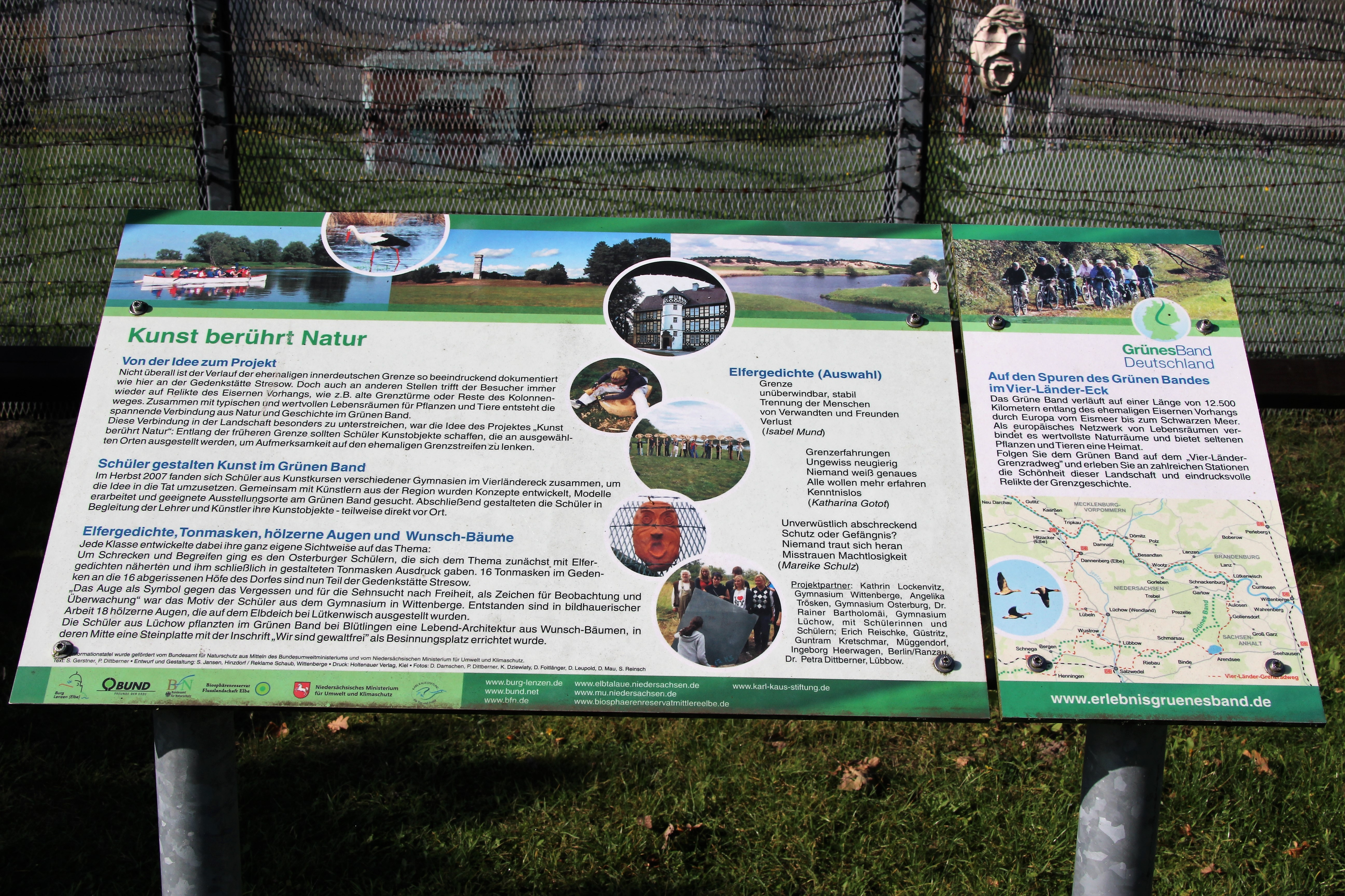 Hinweistafel an der Gedenkstätte